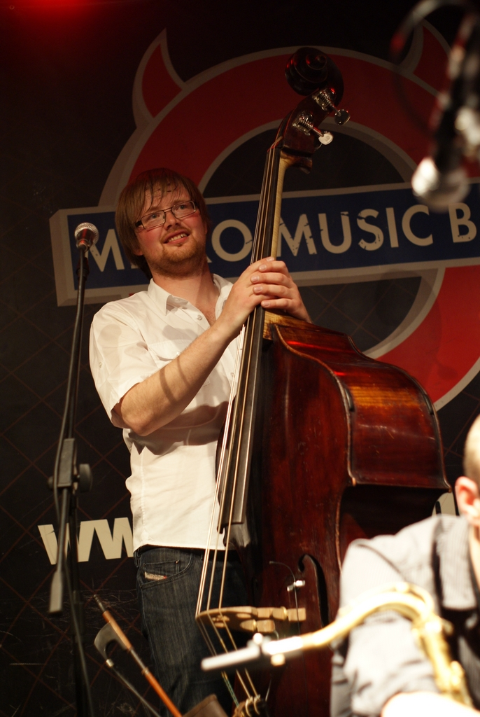 Motif, Jazz Fest Brno, Metro Music Bar